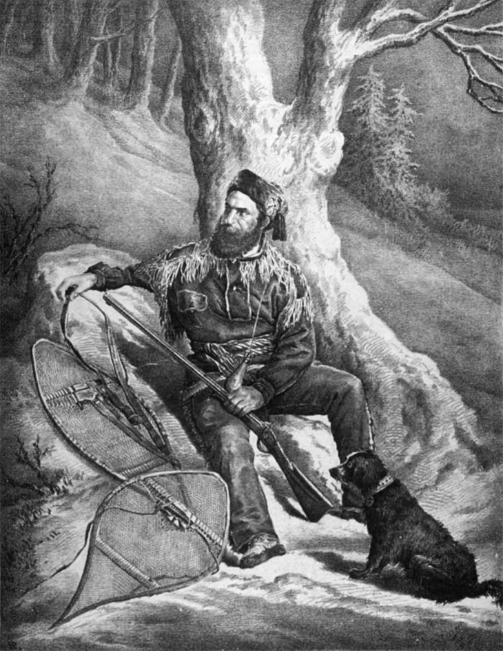 « Frs. Mercier, célèbre voyageur canadien » gravure tirée de L'opinion publique, Vol. 2, no. 43, pp. 517 (26 octobre 1871), d'après une photograpie de William Notman (1826-1891)